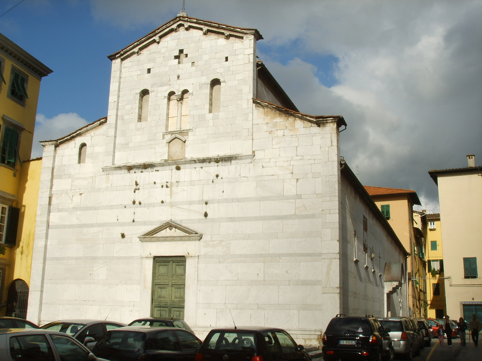 Ancora oggi, nonostante l'invadenza dell'edilizia circostante, che ormai la sovrasta, la chiesa si offre all'osservatore come un puro solido geometrico, definito da linee rette e superfici piane, sensibile solo al variare della luce solare. Questo effetto doveva essere ancora più accentuato nella situazione primitiva, quando il nitido volume del Sant'Alessandro, interamente di pietre squadrate di calcare bianco (in studiato contrasto con un contesto, sicuramente più povero e almeno in parte costruito in legno), si elevava luminoso come un antico tempio su un piccolo podio (oggi interrato per il livello rialzato della piazza), evocando tanto le architetture descritte nelle Sacre Scritture - la Gerusalemme Celeste, il Tempio di Salomone - quanto l'arte ufficiale dell'Impero Romano, e rappresentando così, al tempo stesso e al più alto grado, la fede e l'autorità del potente committente che aveva voluto la chiesa.